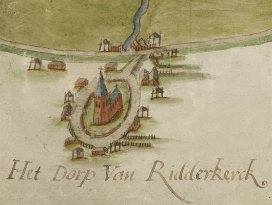 Kaart uit 1584 van Jan Potter, uit de collectie Binnenlandse Kaarten Hingman van het Nationaal Archief. Ridderkerk